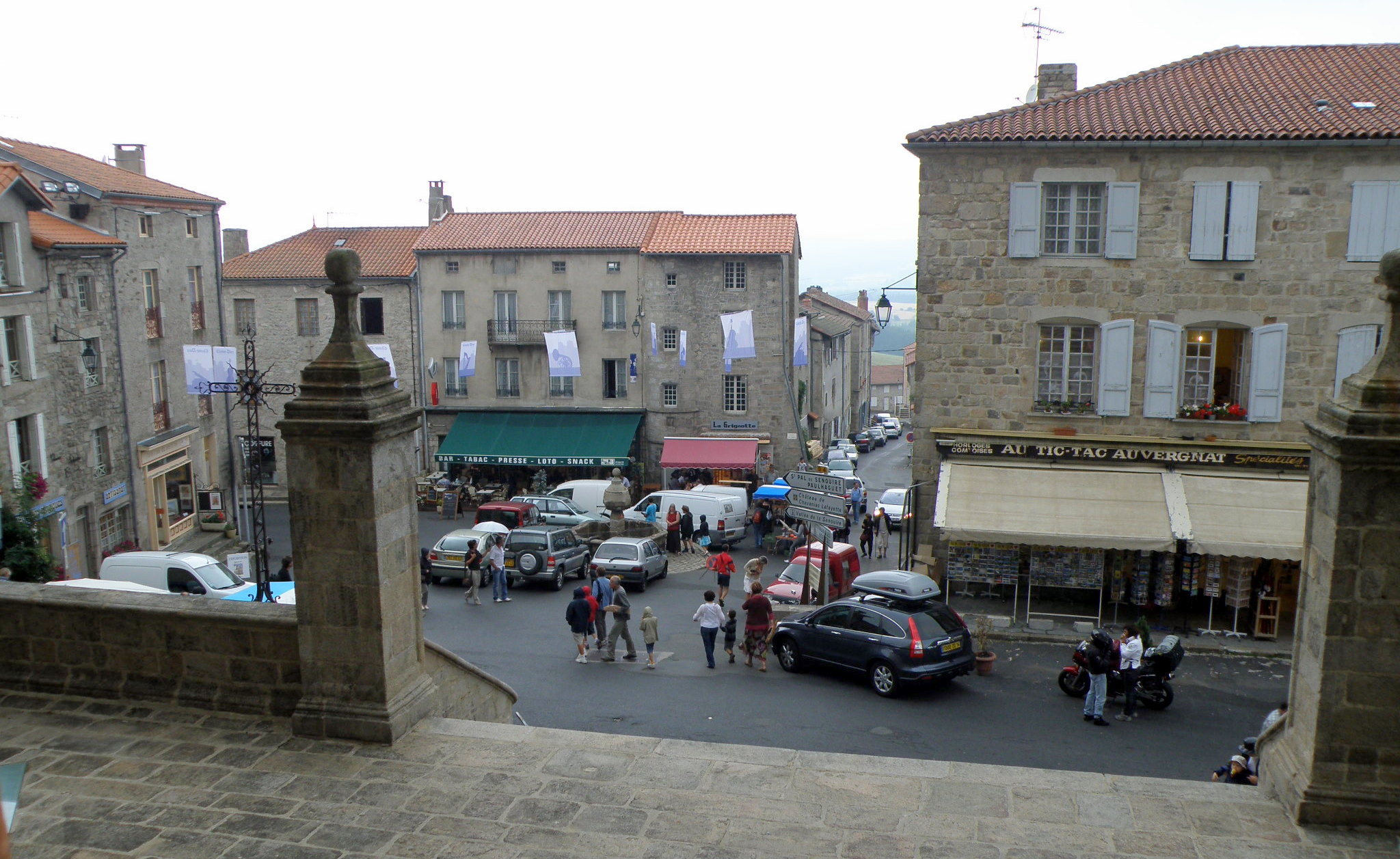 La Chaise-Dieu, dép. de la Haute-Loire, France (Auvergne). Place de l'Abbaye, vue depuis le parvis de l'église abbatiale. Au fond: rue Marchédial.